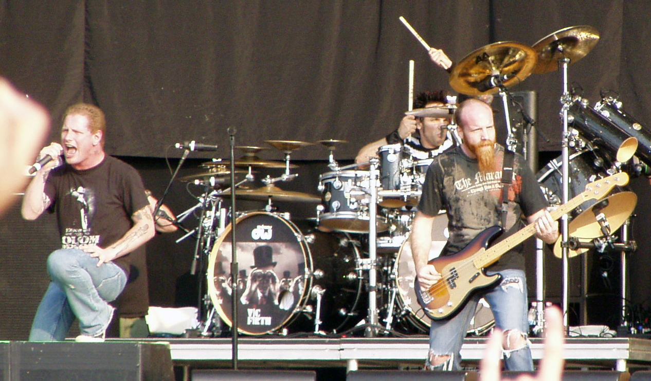 Gli Stone Sour all'Heineken Jammin' Festival 2007